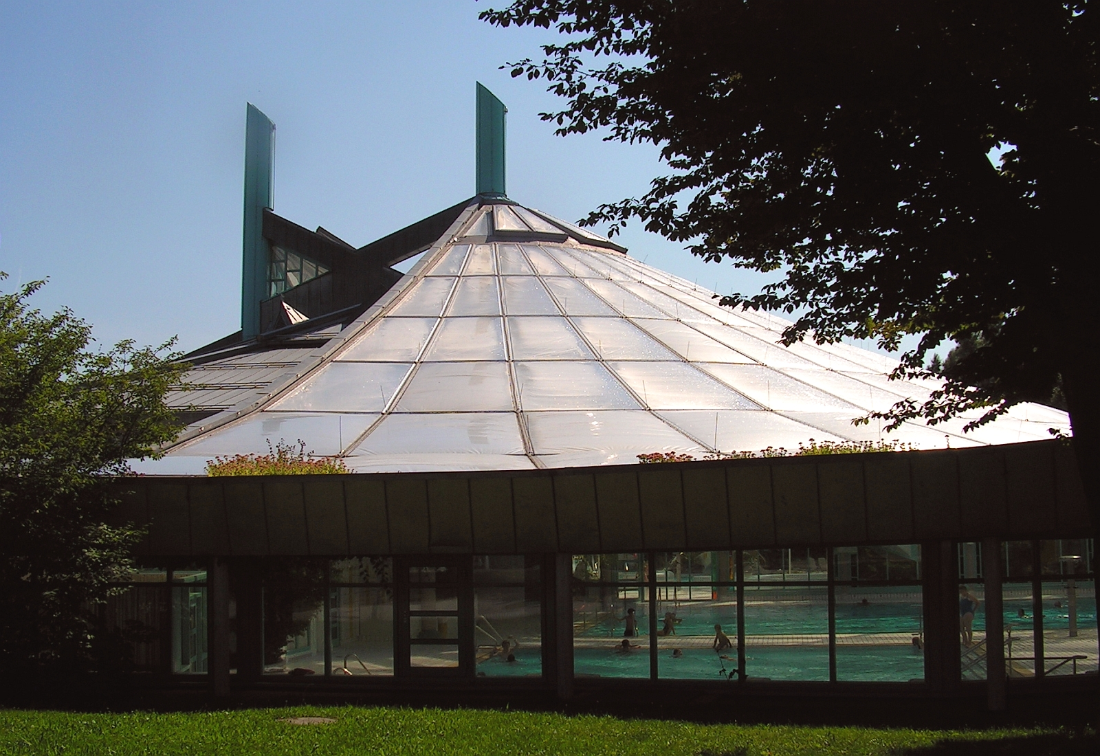 Das Kurfürstenbad ist eines der Bäder der Stadtwerke Amberg (Schwimmbad, Freizeitbad mit 7 Becken) in der Oberpfalz in Bayern - Foto 2005 Wolfgang Pehlemann Steinberg/Ostsee PICT0078